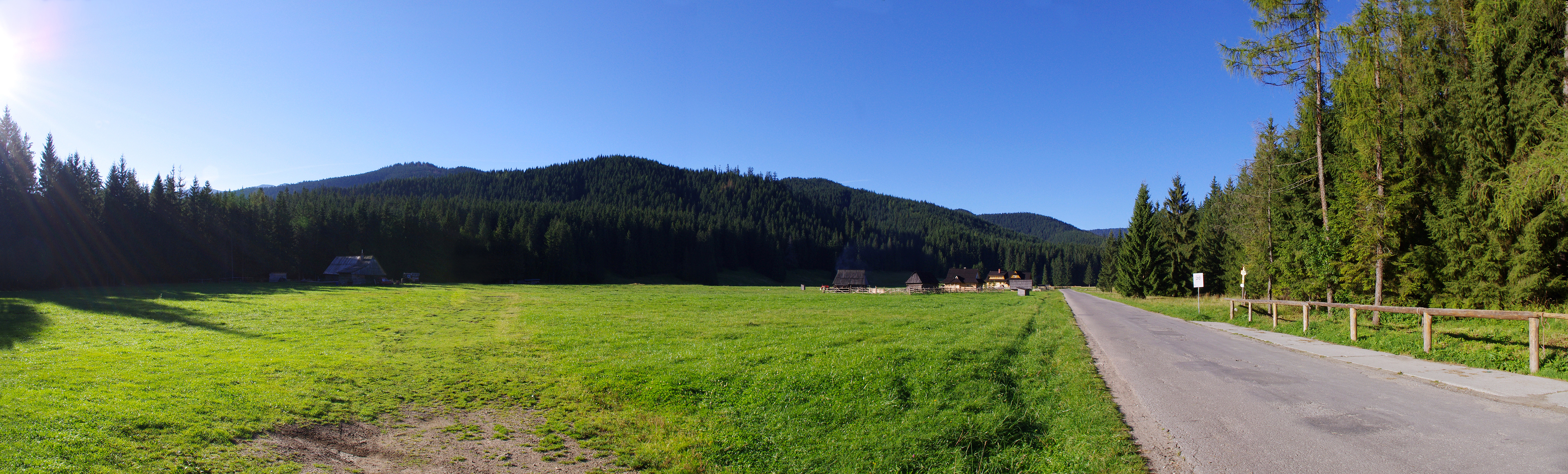 Polana Siwa panorama